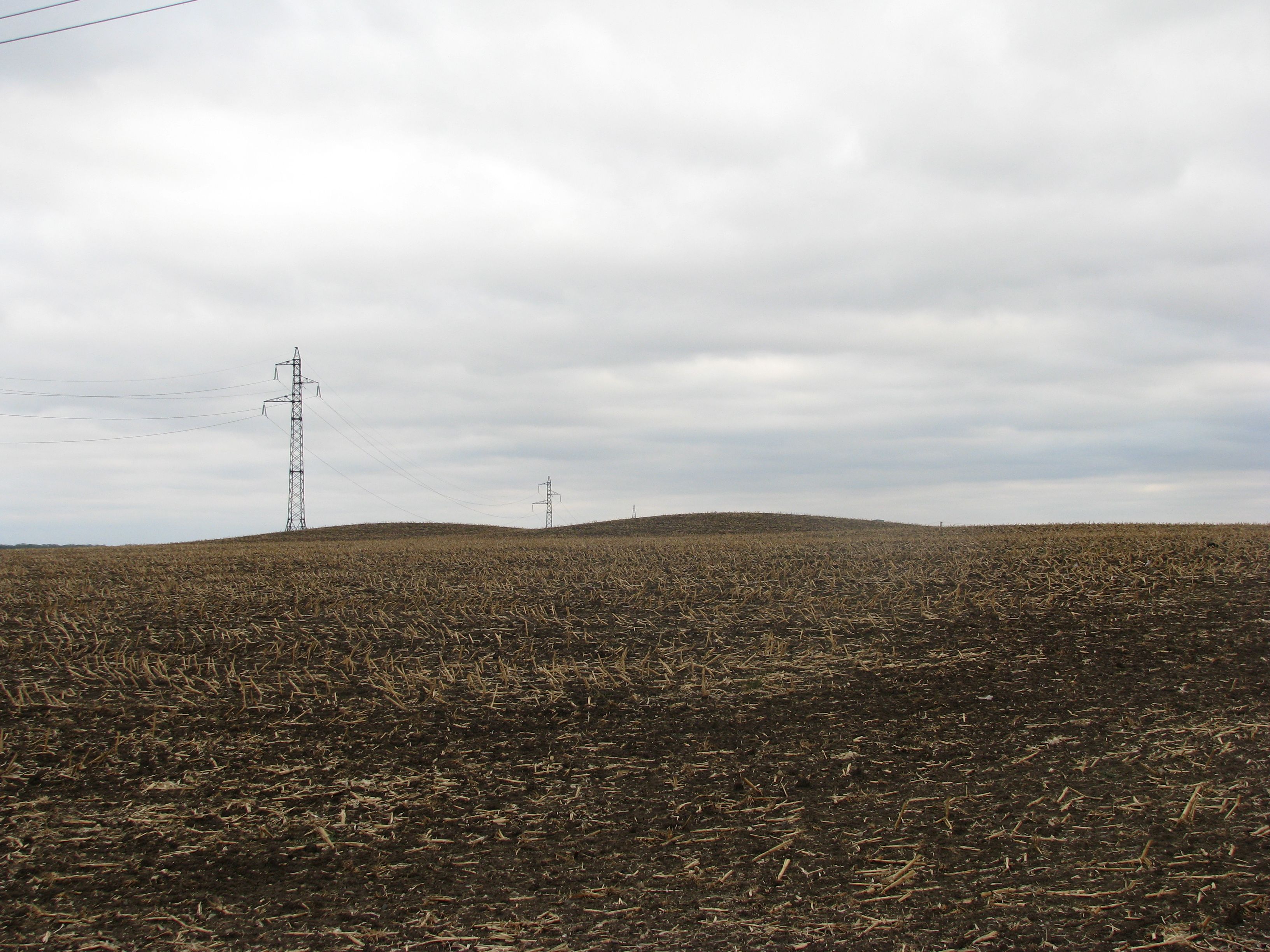 курганная группа (5-курганов): (южная окраина), станица Брюховецкая, Брюховецкий район, Краснодарский край